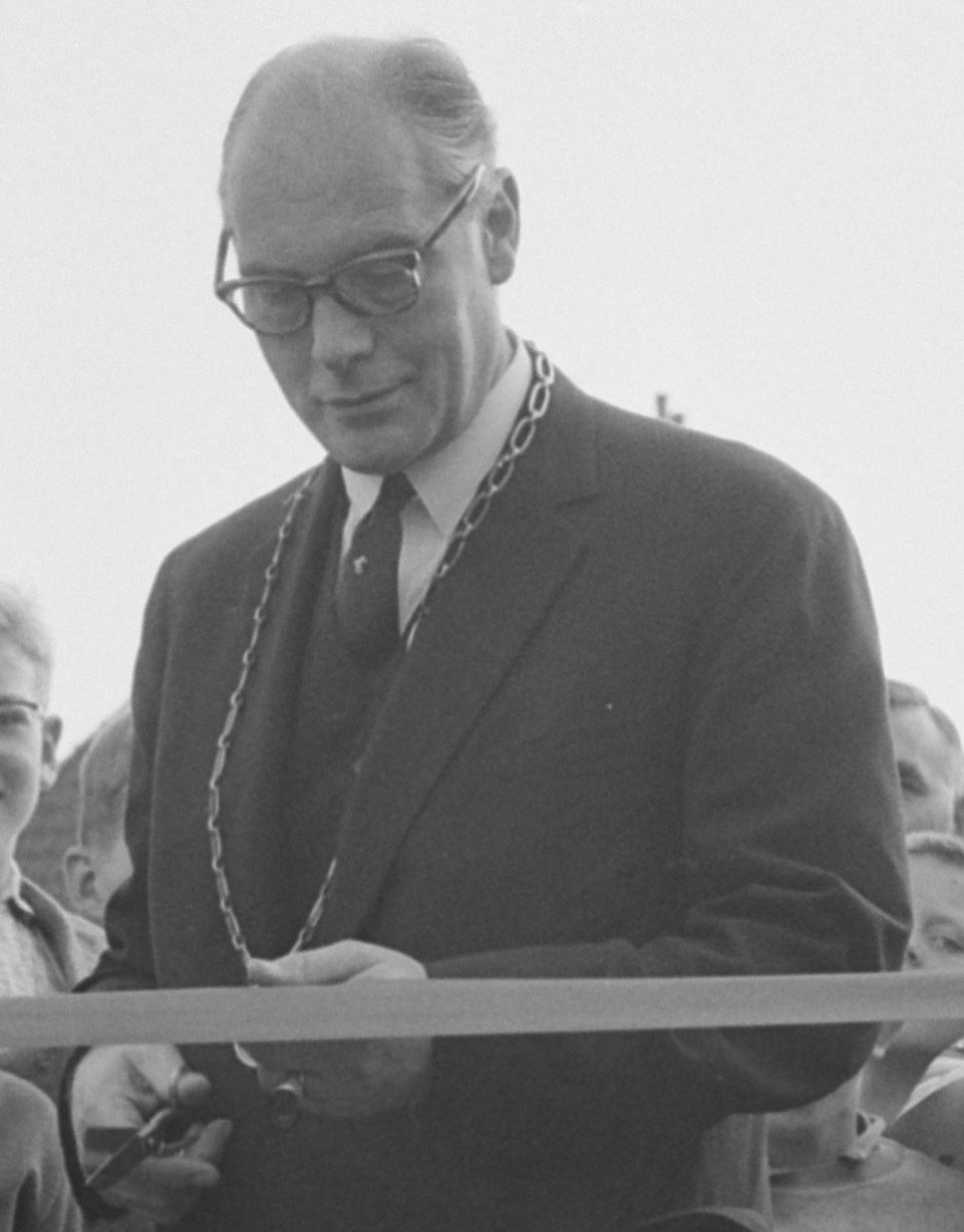 Collectie / Archief : Fotocollectie Anefo Reportage / Serie : [ onbekend ] Beschrijving : In De Bilt , Hessenweg geopend door Burgemeester Fabius Datum : 7 oktober 1962 Locatie : De Bilt Persoonsnaam : Burgemeester Fabius Fotograaf : Gelderen, Hugo van / Anefo Auteursrechthebbende : Nationaal Archief Materiaalsoort : Negatief (zwart/wit) Nummer archiefinventaris : bekijk toegang 2.24.01.05 Bestanddeelnummer : 914-3789